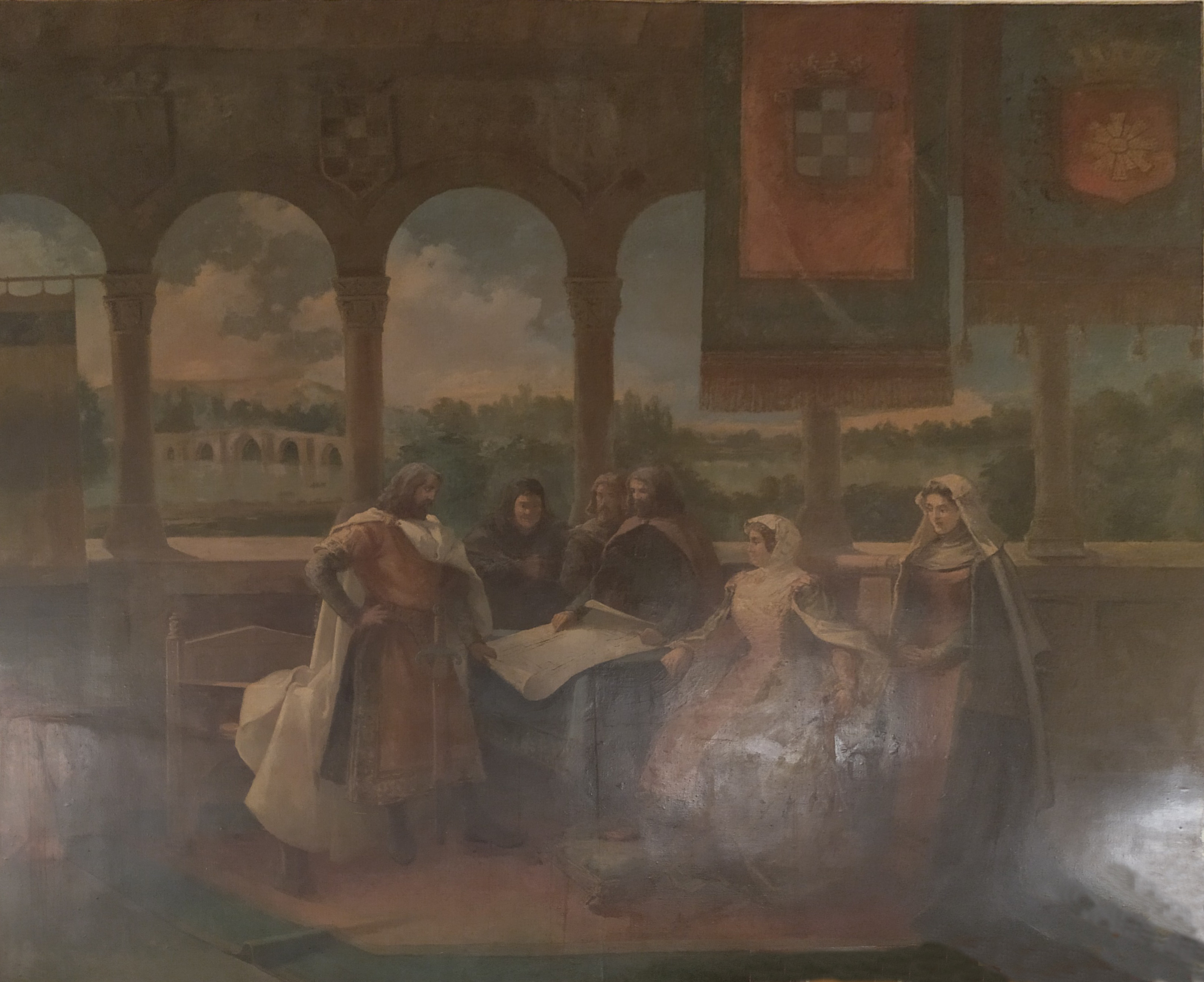 Mural de Eugenio Oliva pintado en el salón de baile del Círculo de Recreo de Valladolid, representando al conde Pedro Ansúrez, su esposa doña Eylo y otros personajes planificando la construcción de la Colegiata de Santa María, desde el desaparecido alcázar de la ciudad. Desde la balconada se ve la ribera del Pisuerga y el puente Mayor en su configuración medieval alomada. Cuelgan dos pendones, uno con el escudo ajedrezado de los Banu Gómez y otro con el primer sello de Valladolid.